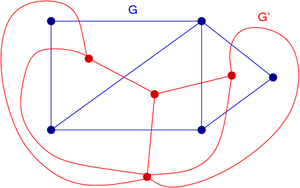 Đồ thị đối ngẫu